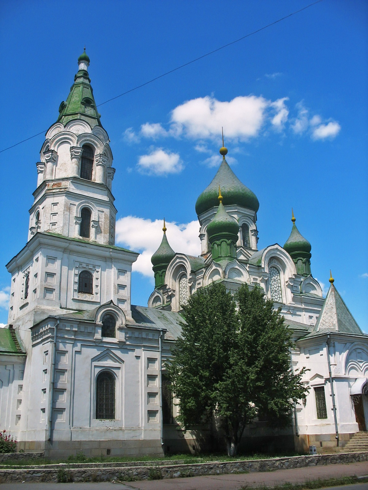 Хрестовоздвиженська Церква, Житомир, вул. Кафедральна, 18